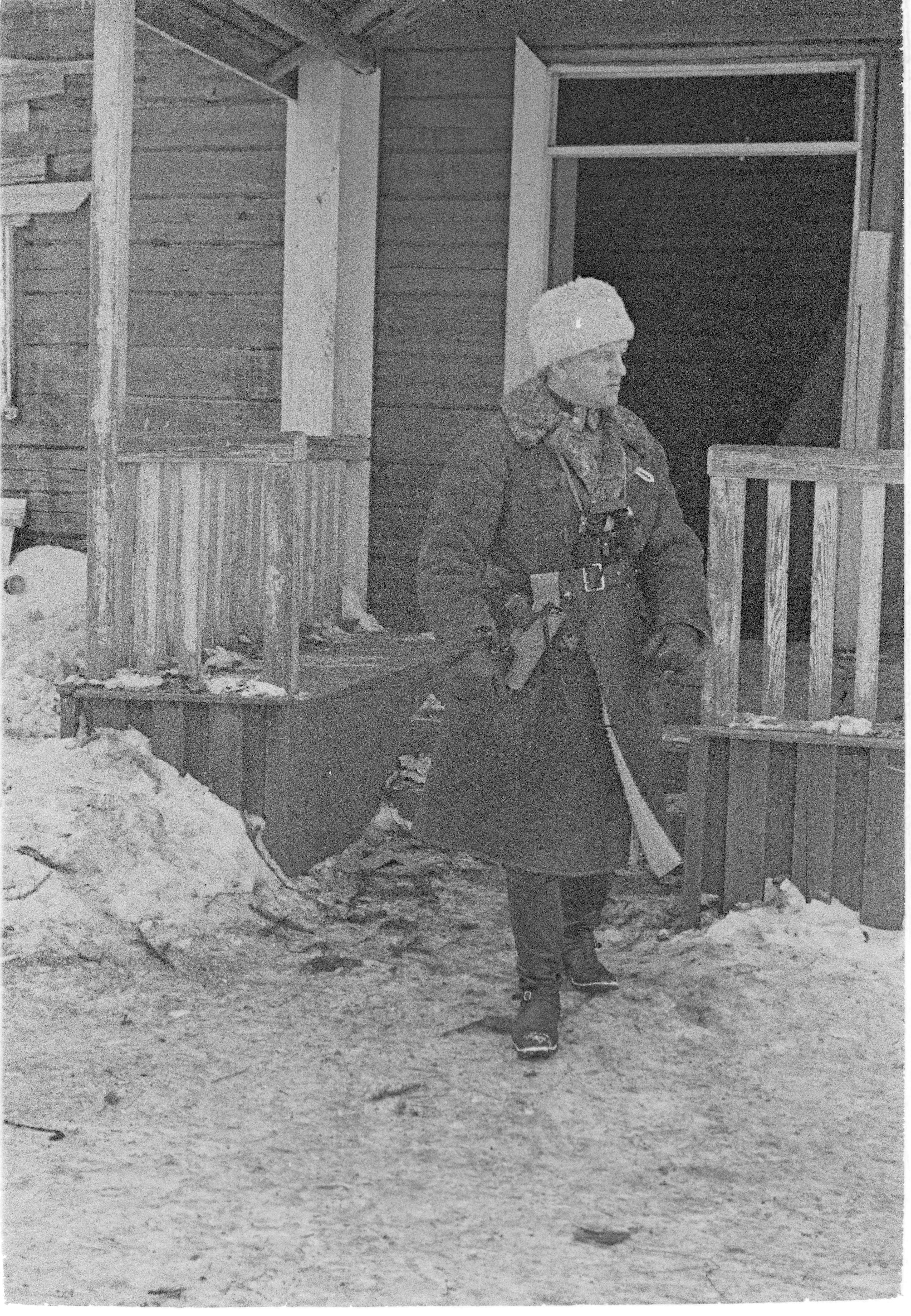 Eversti Pajari Tolvajärven esikunnan edustalla Tolvajärvi 1940.03.19. SA-kuvat